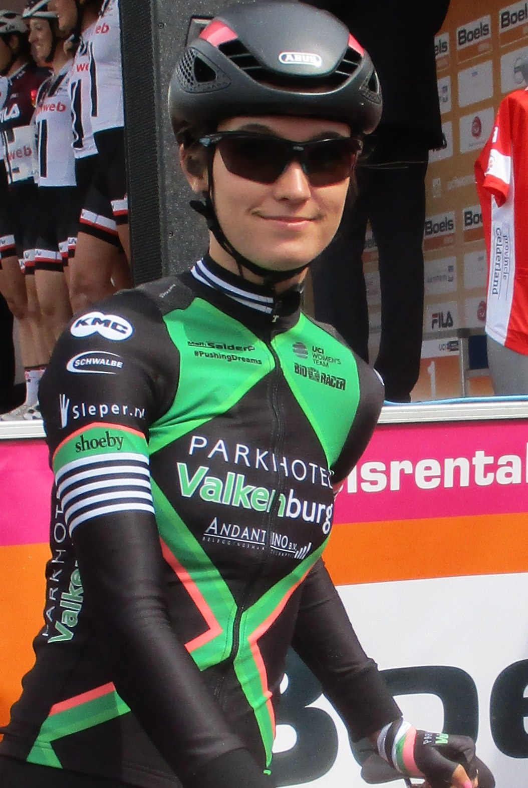 4e etappe van de Boels Ladies Tour 2018 door Noord-Limburg, start in Stramproy.